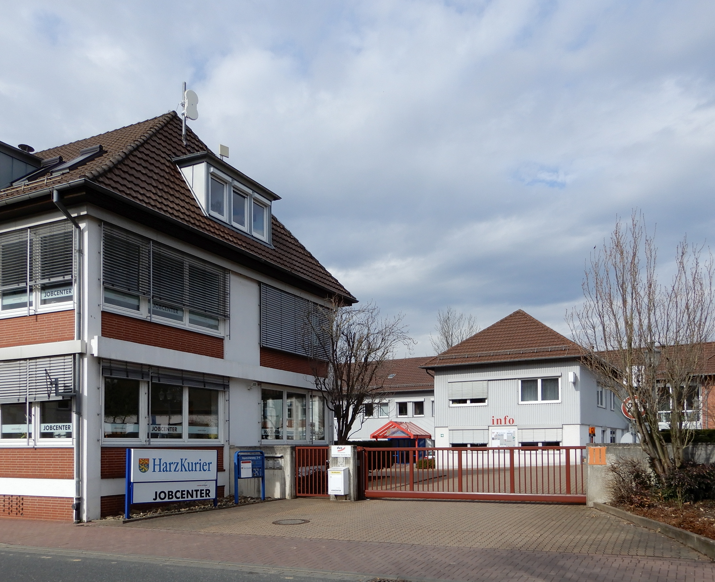 Gebäude Gipsmühlenweg 4 in Osterode am Harz